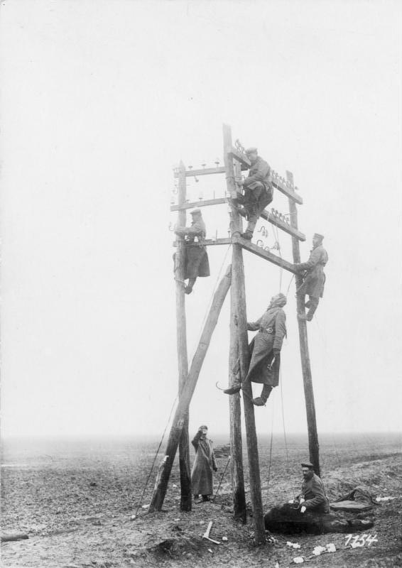 Rumänien Zu den Kämpfen am Sereth: Telegraphentrupp in der großen Walachei beim Legen vorgeschobener Linien. Information added by Wikimedia users.